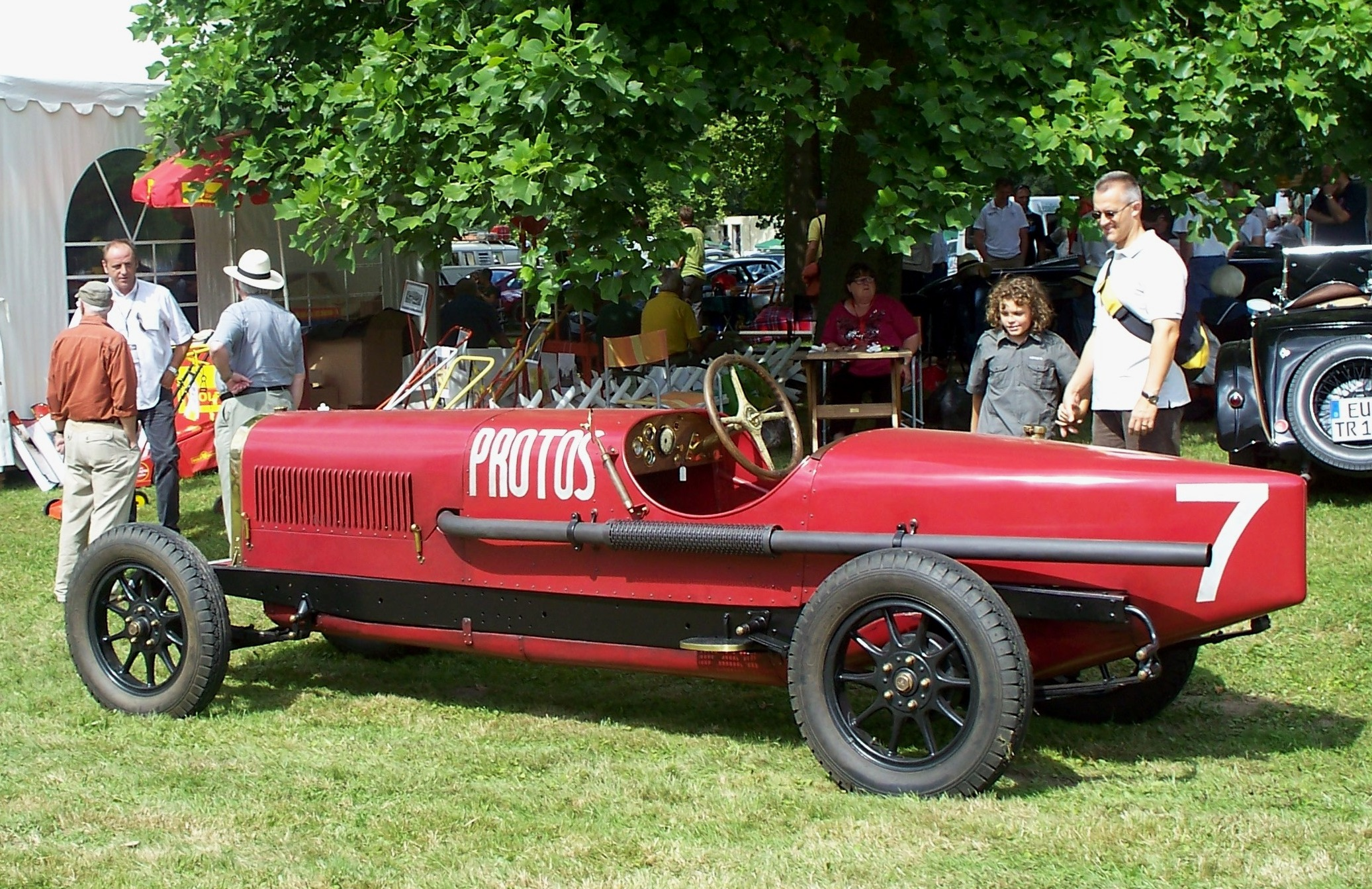 Protos Rennwagen Foto: Schloss Dyck Days